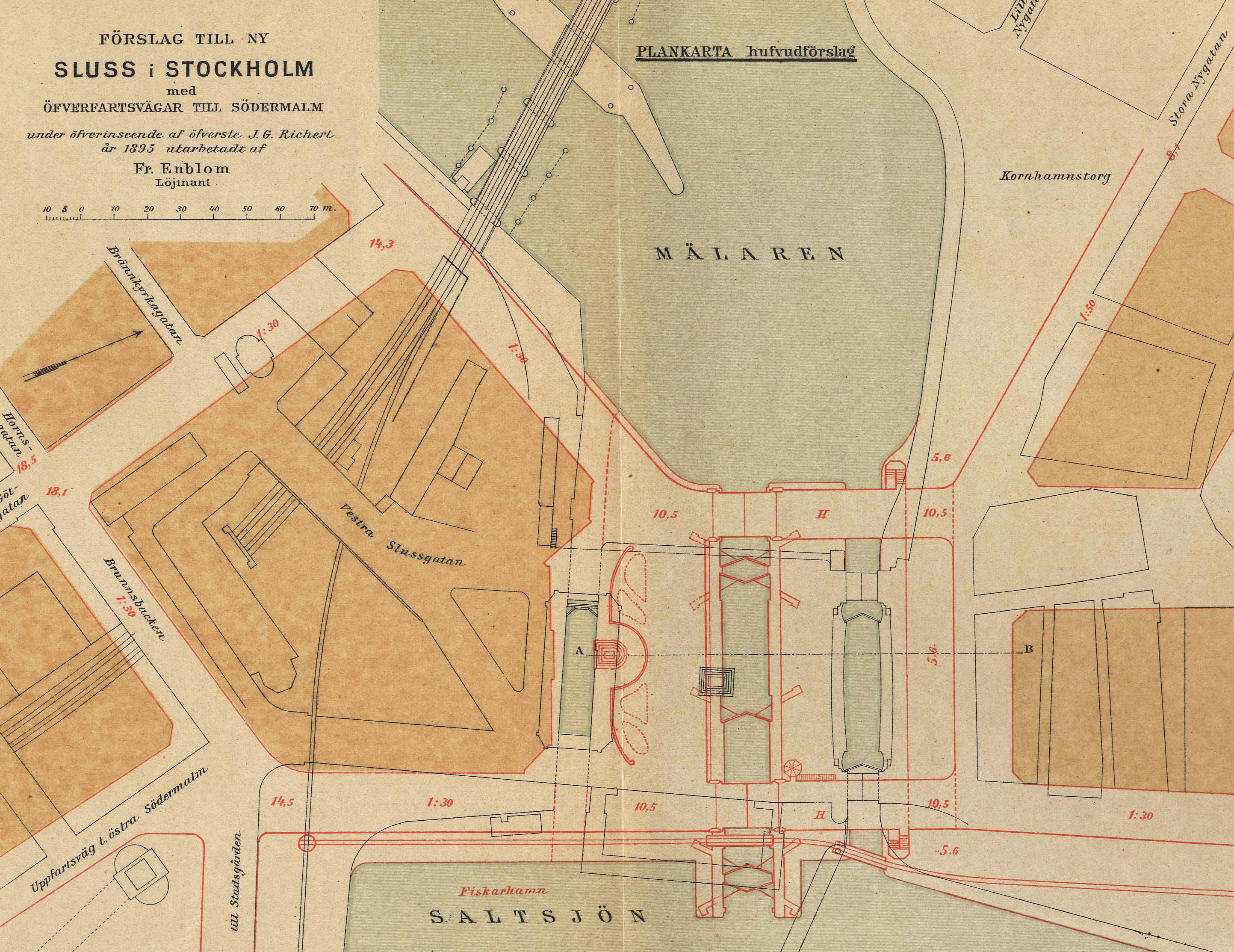 Förslag till ny, central placerad sluss i Stockholm med överfartsvägar till Södermalm